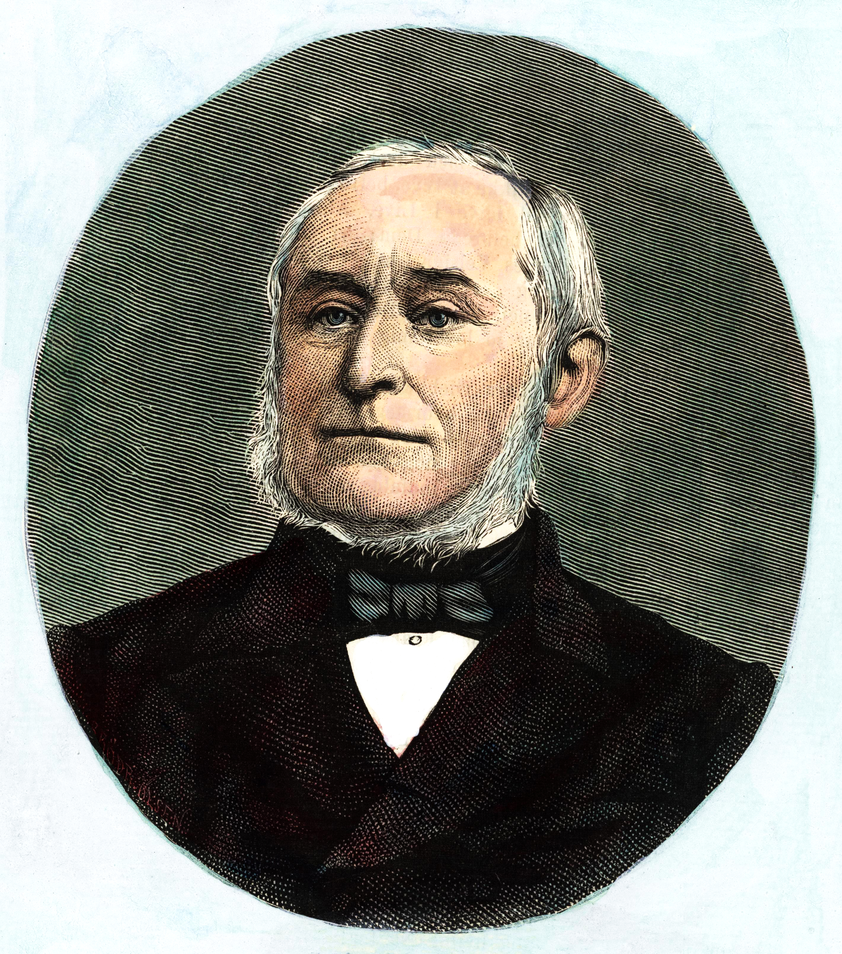 Format: Kolorert tresnitt Dato / Date: Ukjent Kunstner / Artist: Ukjent Wikipedia: Ivar Geelmuyden (1819 - 1875) Geni: Ivar Christian Sommerschild Geelmuyden (1819 - 1875) Eier / Owner Institution: Trondheim byarkiv, The Municipal Archives of Trondheim Arkivreferanse / Archive reference: Tor.H49.B04.F23995 Merknad: Medfølgende billedtekst: Rektor Geelmuyden. I vor Tid, da hvert enkelt Fag kræver saa vidtstrakte Forudsætninger hos den enkelte og da altsaa Erhvervelsen af Specialkundskaber gjerne optager det meste af en Mands Uddannelsestid, bliver det alt sjældnere og sjældnere at træffe Begavelser, der i Besiddelse af alsidige Interesser formaar forskjellige Omraader at fylde en Plads værdigt og sikkert. Den nys afdøde Rektor Geelmuyden var en saadan Mand. Ivar Kristian Sommerschild Geelmuyden fødtes 8de April 1819 i Trondhjem af Forældrene Mægler Hans Geelmuyden og Kristense Henriette Sommerschild. Han bestemtes først sent til Studeringerne men gik Trondhjems Latinskole raskt igjennem, saa han allerede ved 18 Aars Alderen kunde dimitteres derfra i 1837 samtidig med bl. A. nuværende Rektor ved Kristiania Latinskole Müller. Han blev Student med Karakteren Laudabilis præcæteris. Efter i nogen Tid at have studeret Theologi slog han om og kastede sig over det filologiske Studium, som han drev med megen Iver og for hvilket han besad særlig Begavelse. Da han i 1844 havde taget Examen med bedste Karakter, gik han ind som Lærer ved den da nylig oprettede "Nissens Latin- og Realskole", som just skyldte en Række yngre dygtige Lærere, blandt hvilke flere senere er kommet i fremragende Stillinger, at den saa hurtig vandt Anseelse og kom i Skuddet. Geelmuyden forblev knyttet til denne Anstalt indtil han i 1852 udnævntes til Overlærer ved Fredrikshalds Latinskole, hvorfra han i 1865 forflyttedes til Bergens Latinskole som Rektor. I dette Embede døde han. Kolorert Tresnit m. biografisk Tekst.